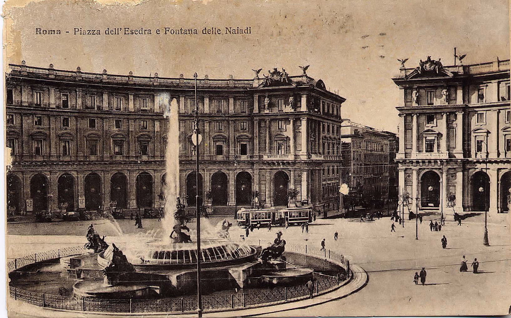 Piazza esedra